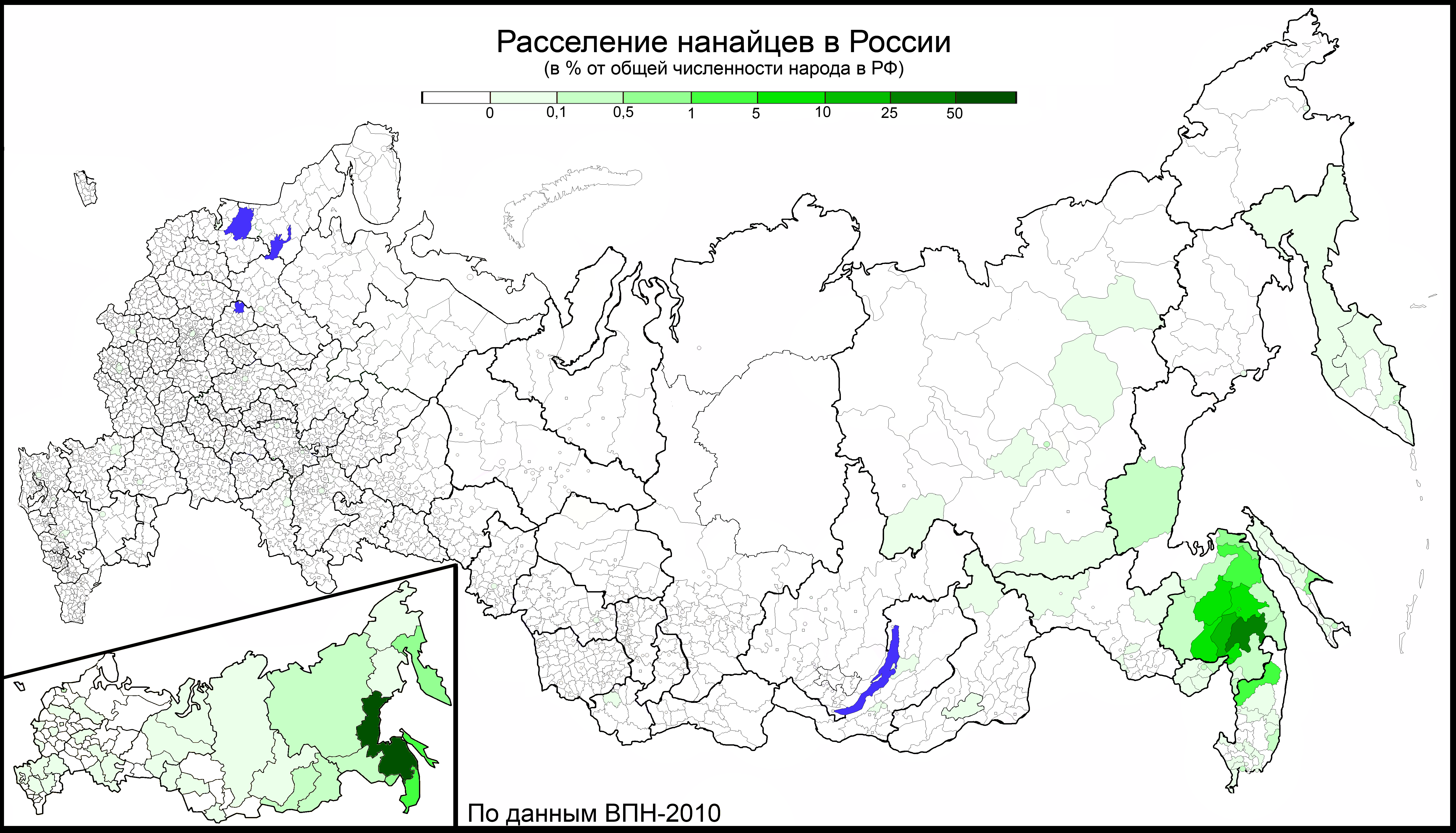 Расселение нанайцев в России по муниципальным районам и городским округам в % от общей численности этого народа в РФ. По переписи 2010 года